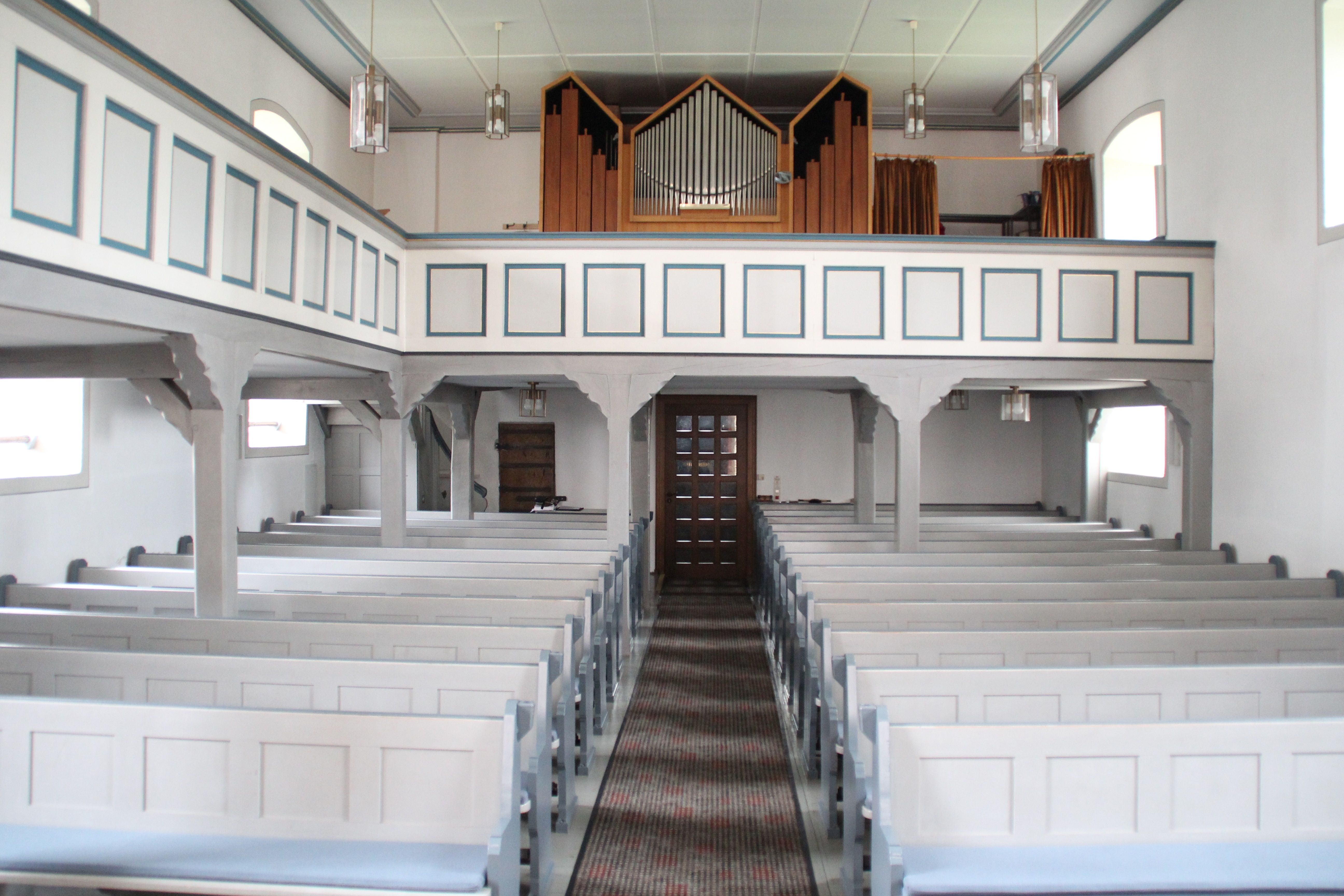 Kirchenschiff der evangelischen Martinskirche zu Marburg-Wehrda mit Emporen und Lötzerich-Orgel